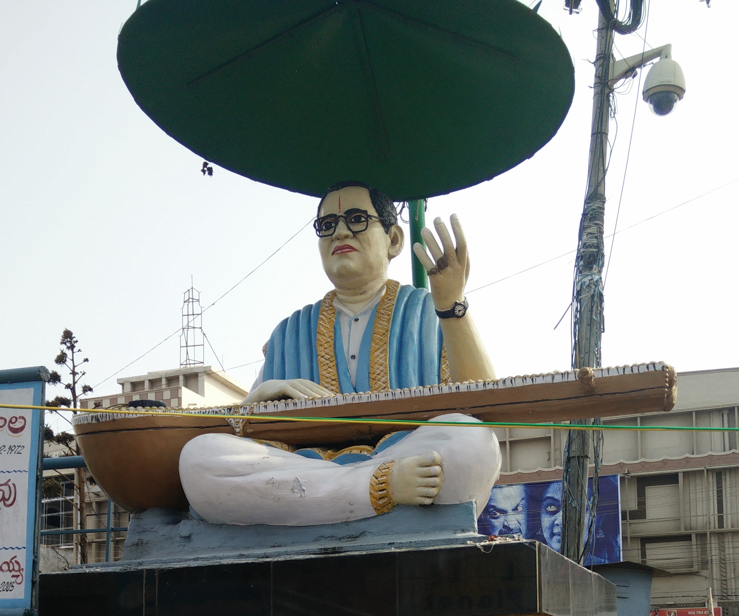 Ghantasala Venkateswara Rao popularised by surname Ghantasala was playback singer for Telugu, Tamil, Kannada, Malayalam movies. His statue at Guntur Naaz center.